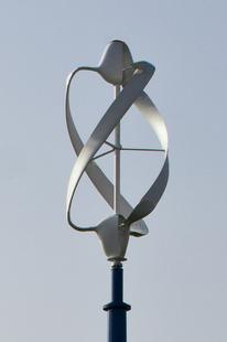 noveolienne en gros plan